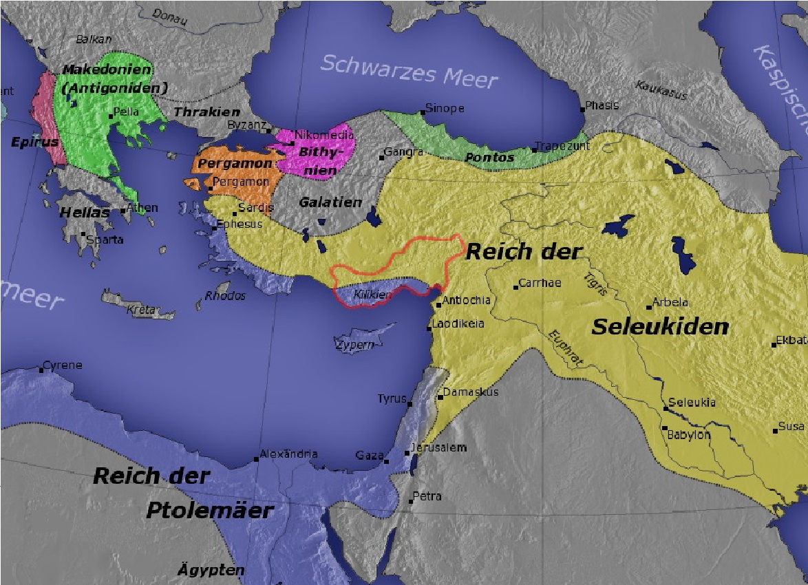 Carte centée sur la satrapie de Cilicie